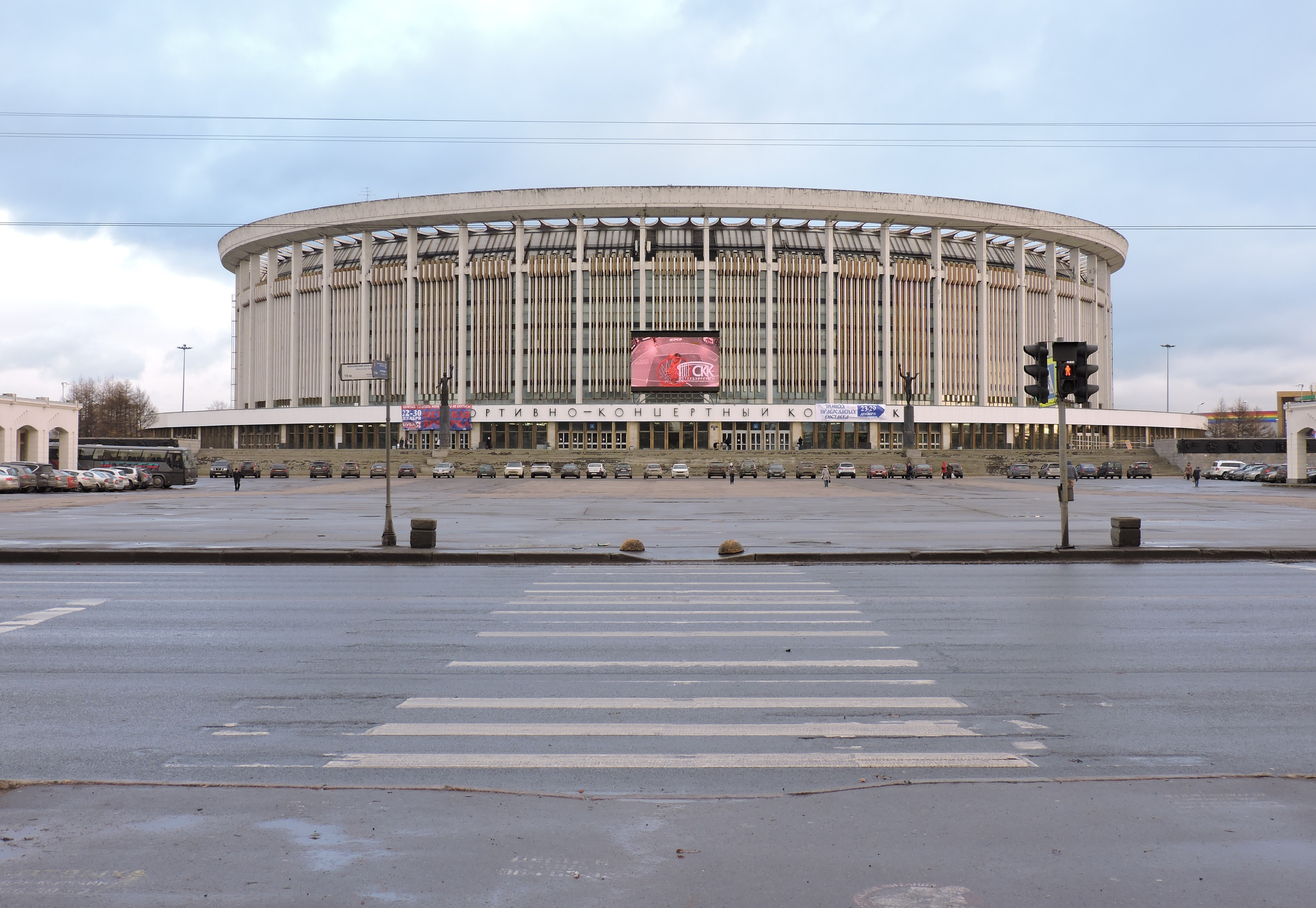 СКК "Петербургский"